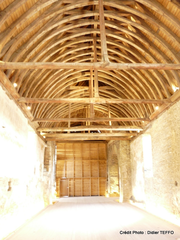 Vue d'ensemble de la charpente de l'église St Pierre aux liens du Vieux-bourg de Nozay